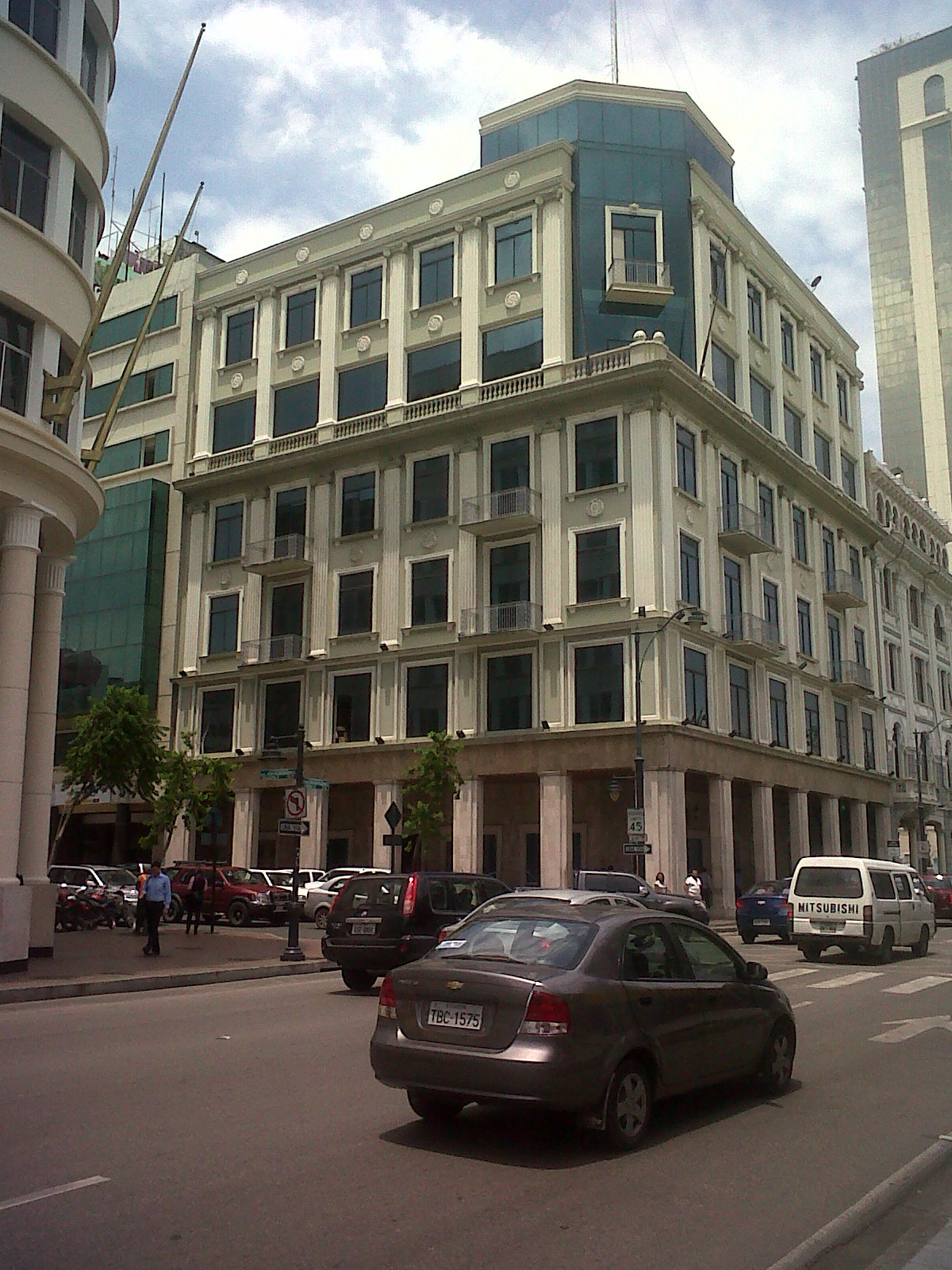 Edificio del Consejo Provincial del Guayas.